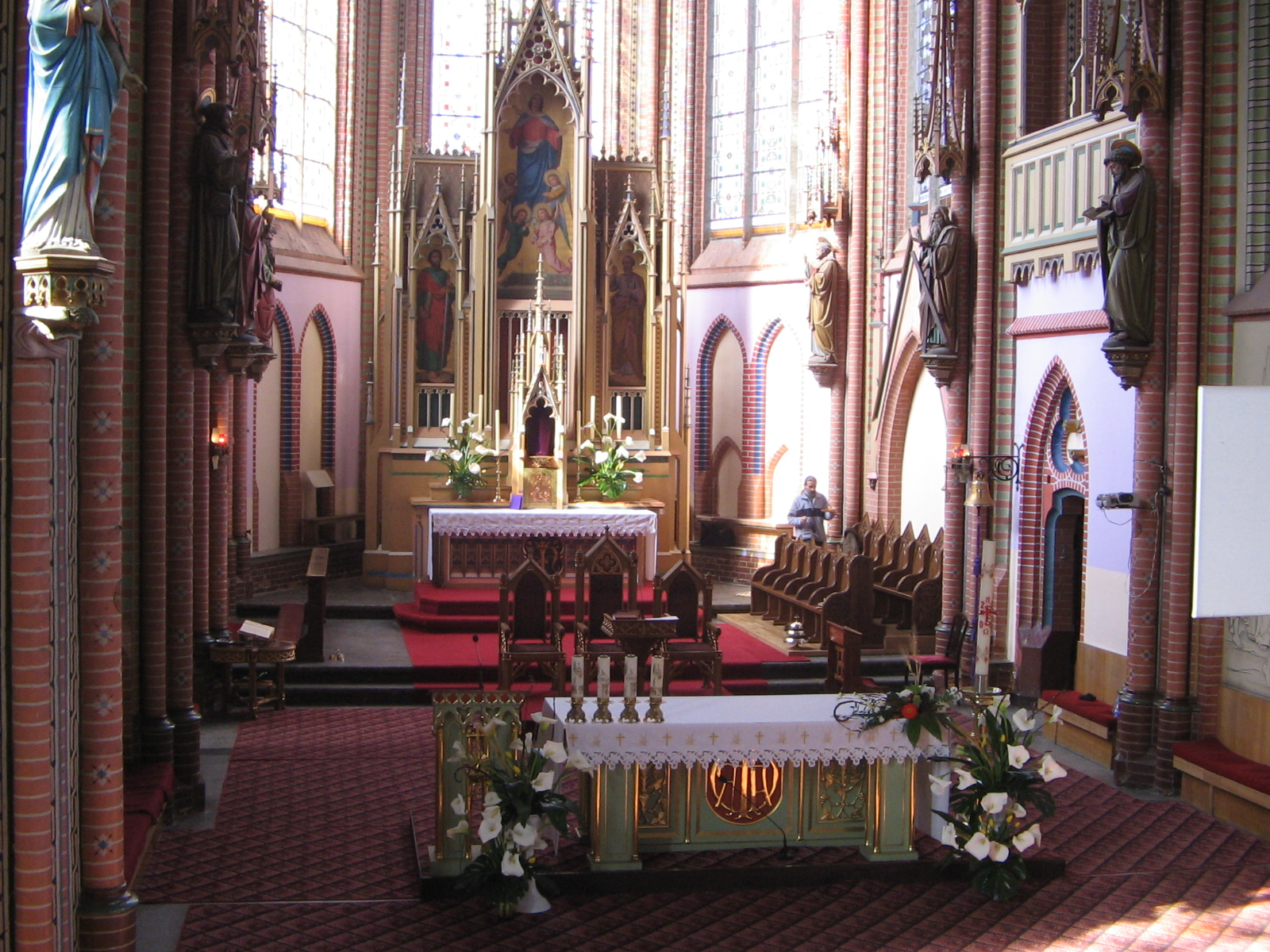 Przezbiterium kościoła WNMP w Bielawie